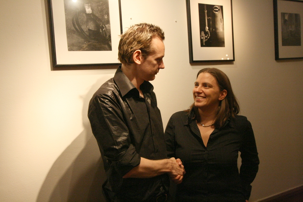 Julian Assange och Anna Troberg skakar hand